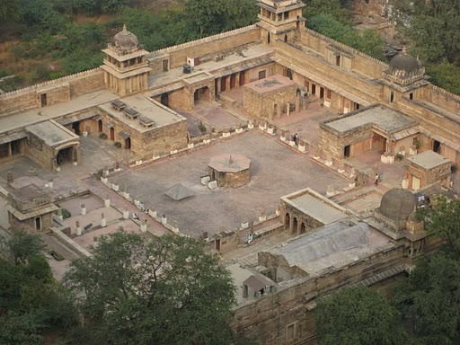 Gujari mahal